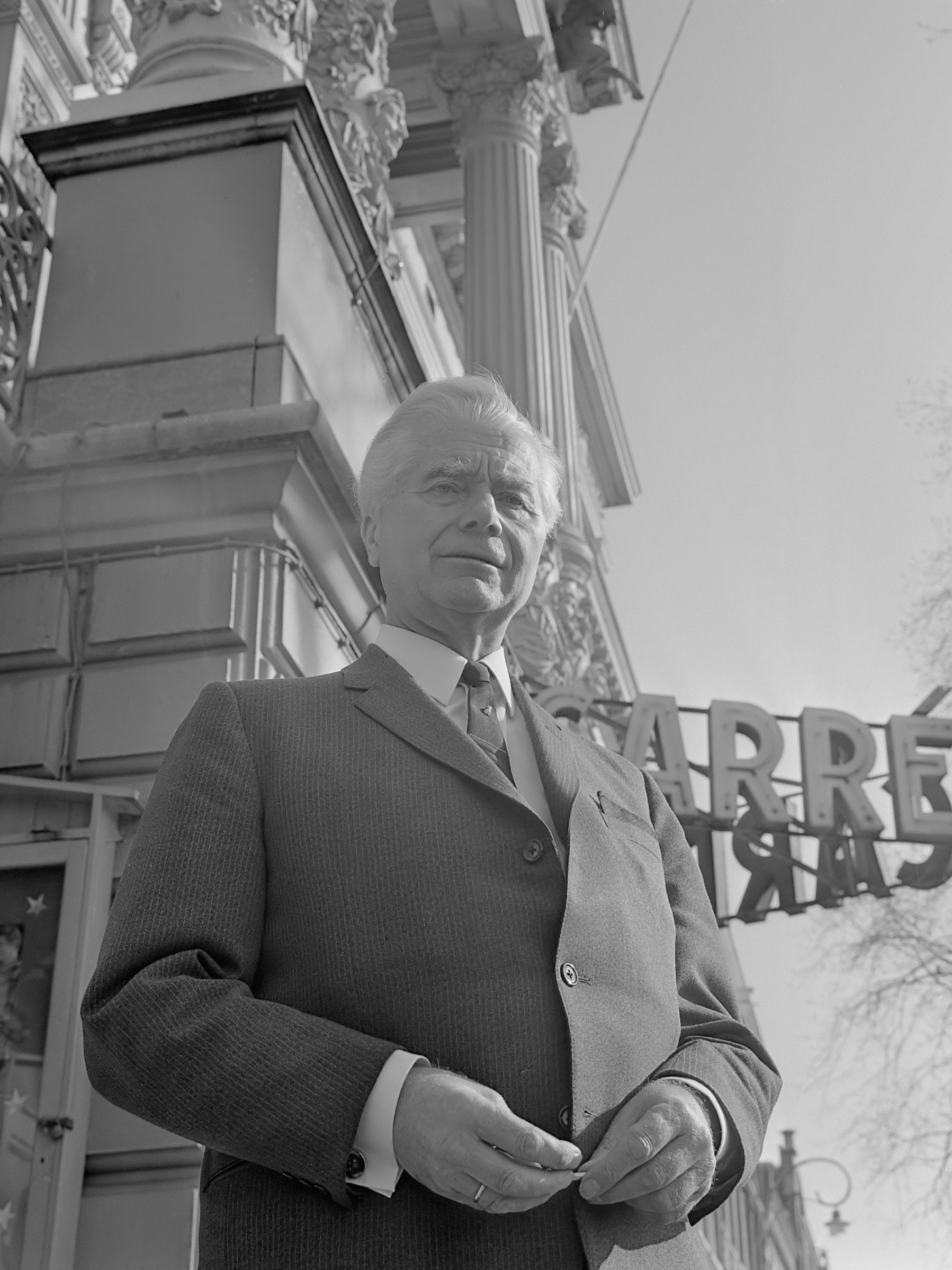 Opdracht Elsevier directeur van Carre, K. Wunnink jr., kop